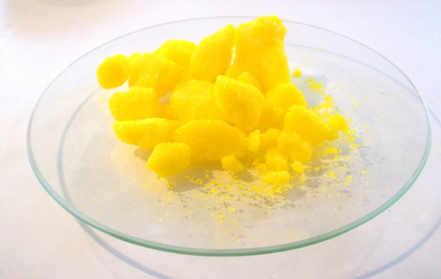 Na2CrO4